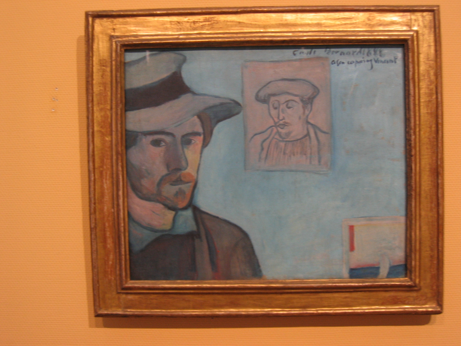 Zelfportret met portret van Gauguin - Self-portrait with portrait of Gauguin 1888 Emile Bernard (1868-1941) olieverf op doek / oil on canvas Vincent van Gogh Stichting Van Gogh Museum Amsterdam Paulus Potterstraat 7 Fotografie in het kader van 'Wiki Loves Art' dinsdag 23 juni 2009 08.00 - 10.00 uur Zelfportret met portret van Gauguin - Self-portrait with portrait of Gauguin 1888 Emile Bernard (1868-1941) olieverf op doek / oil on canvas Vincent van Gogh Stichting Van Gogh Museum Amsterdam Paulus Potterstraat 7 Fotografie in het kader van 'Wiki Loves Art' dinsdag 23 juni 2009 08.00 - 10.00 uur